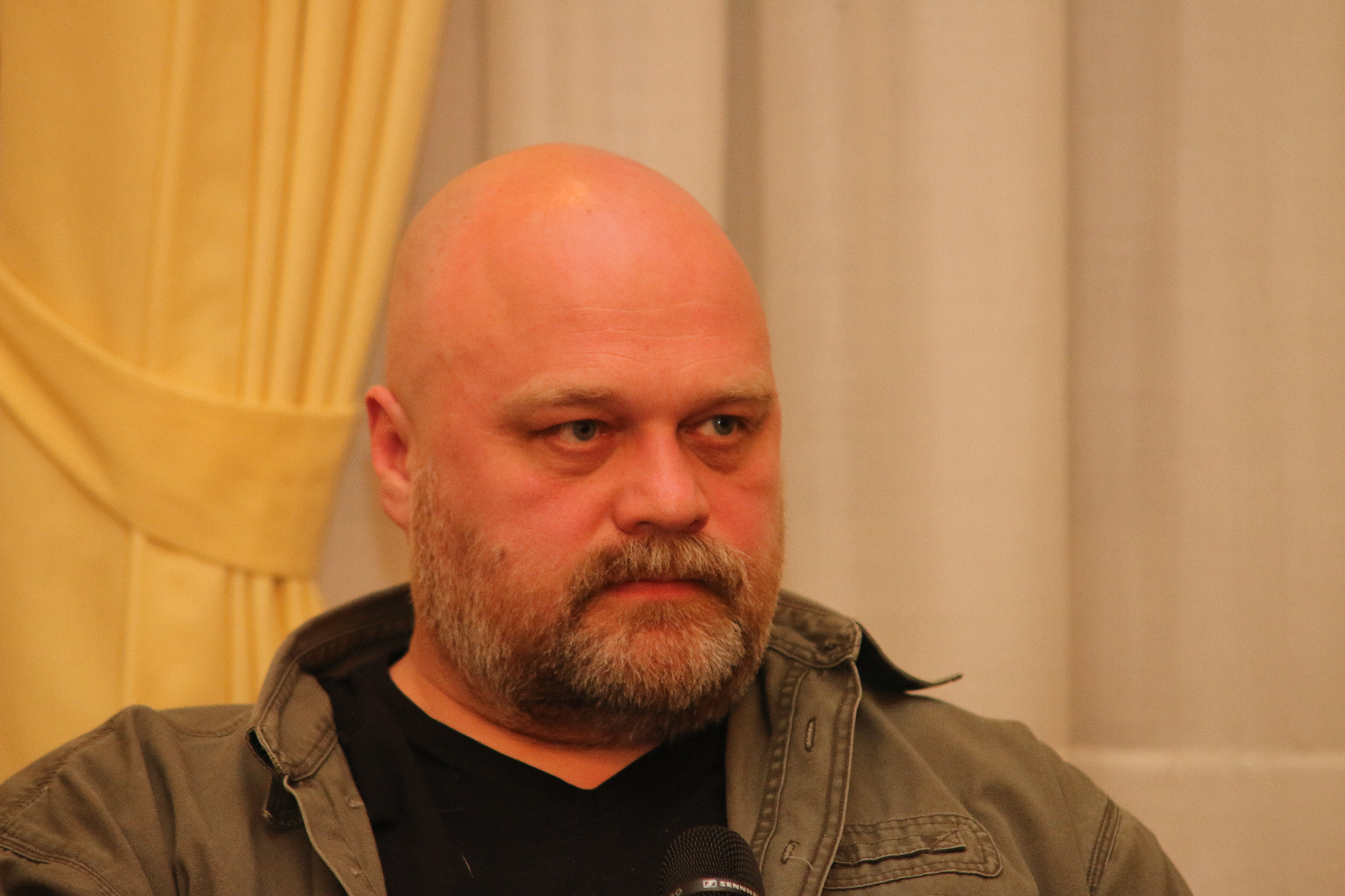 15. GoEast Festival, Wiesbaden 2015: Der russische Regisseur Aleksey Fedorchenko bei der Deutschlandpremiere seines Films Angely Revolytsii